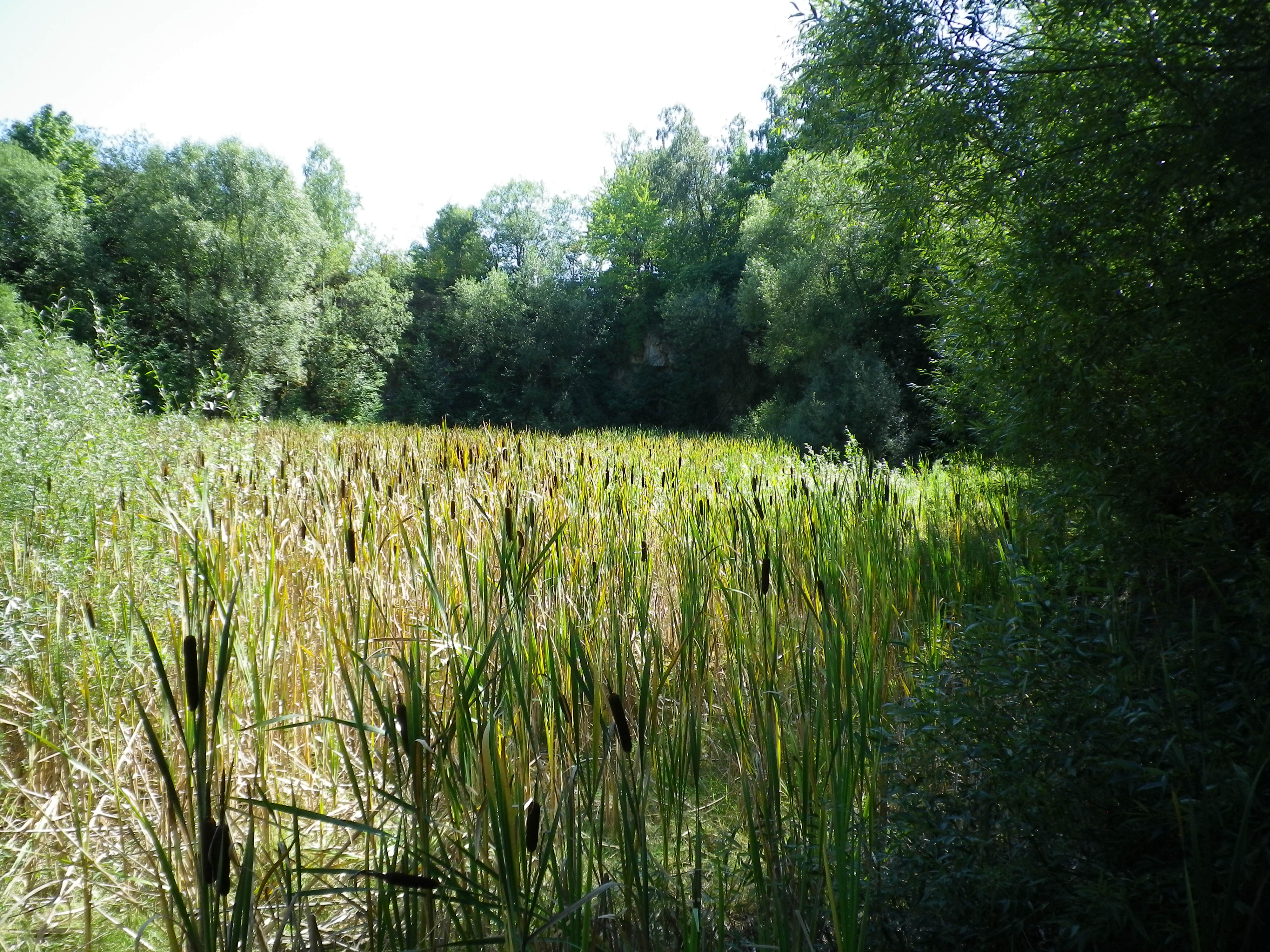 Geotop bei Gaimersheim